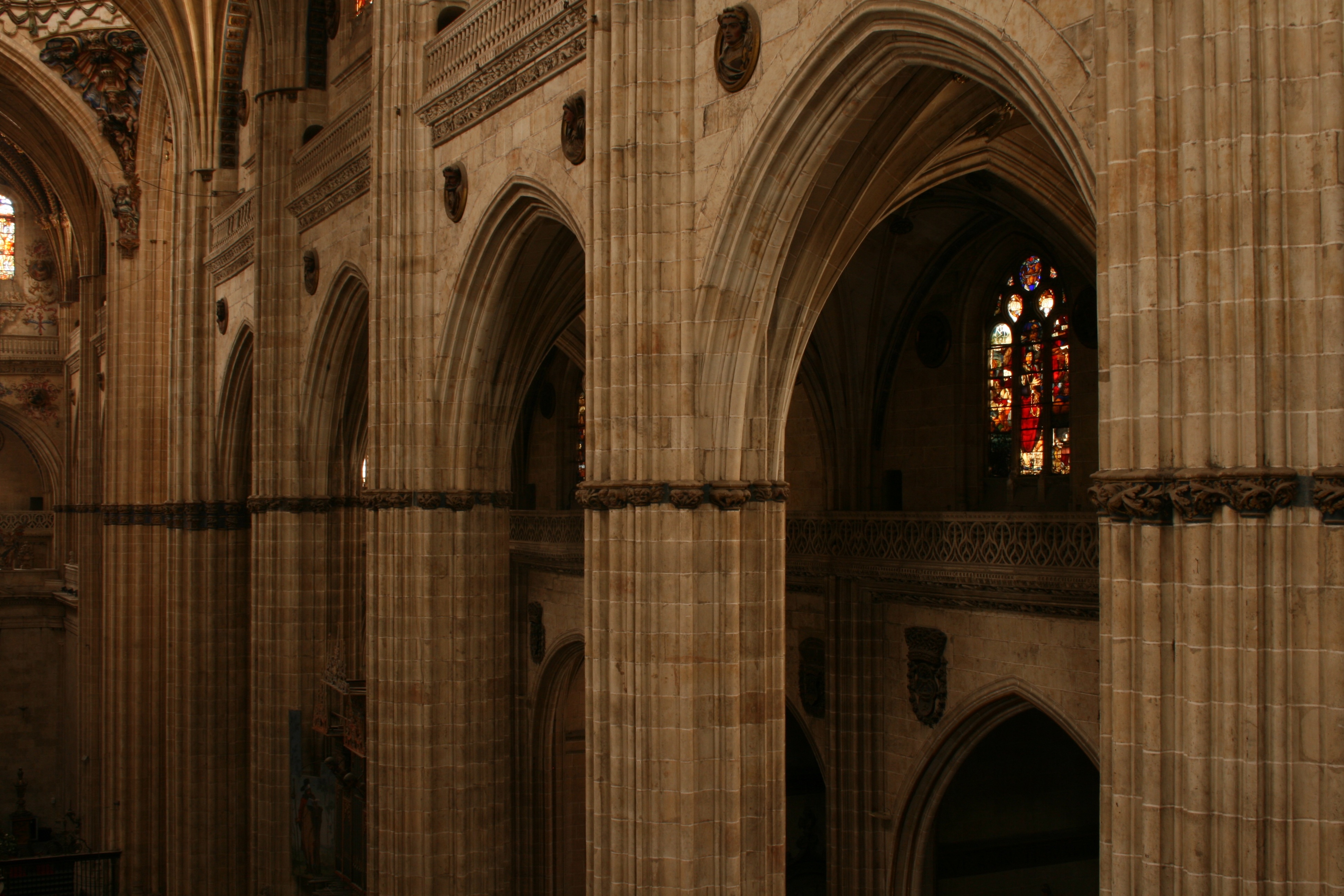 Columnas del interior